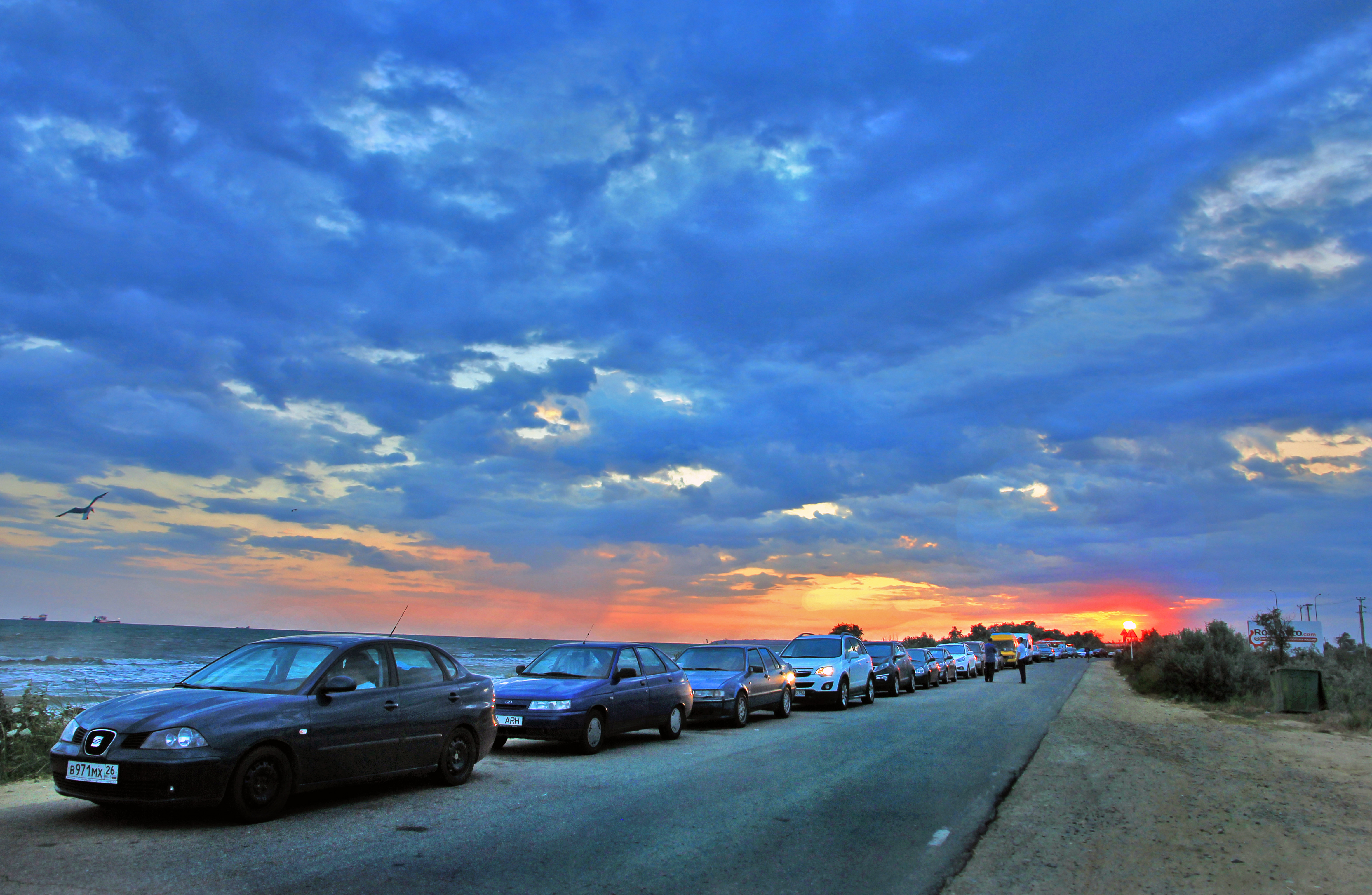 Autod on öö läbi oodanud pääsu praamile.Kertsi väina kaldal 2014.a